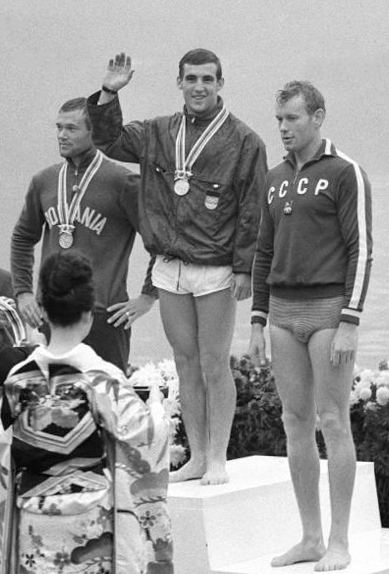 ADN-Zentralbild/Kohls 24.10.1964 XVIII: Olympische Sommerspiele Tokio 1964 Siegerehrung im Einer-Canadier UBz: Jürgen Eschert (DDR) erkämpfte sich die Goldmedaille, der Rumäne Andrej Igorow (links) die Silbermedaille und der sowjetische Kanu-Sportler Jewgeni Panjajew errang die Bronzemedaille.